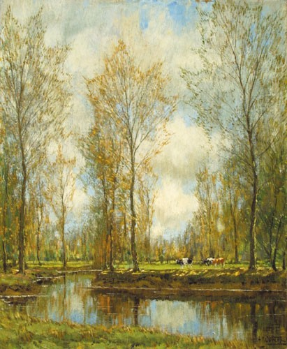 "Grazende koeien langs de Vordense beek"